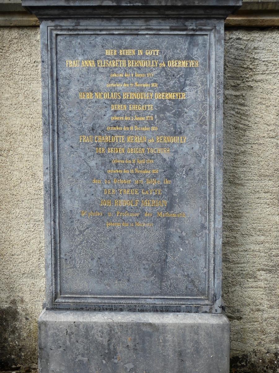 Johann Rudolf Merian (1797-1871) Professor der Mathematik, Politiker, Grab auf dem Friedhof Wolfgottesacker, Basel